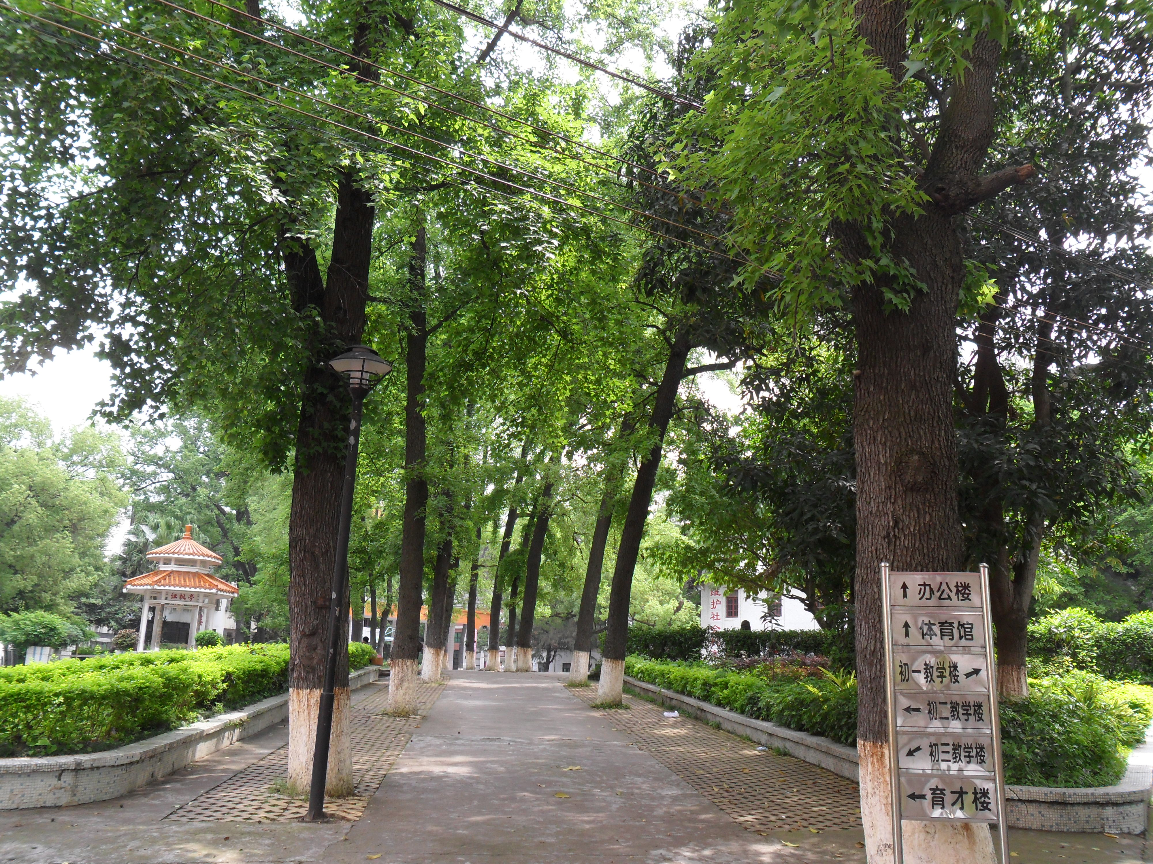 位于梧州一中原址，两侧为枫树，现已拆毁